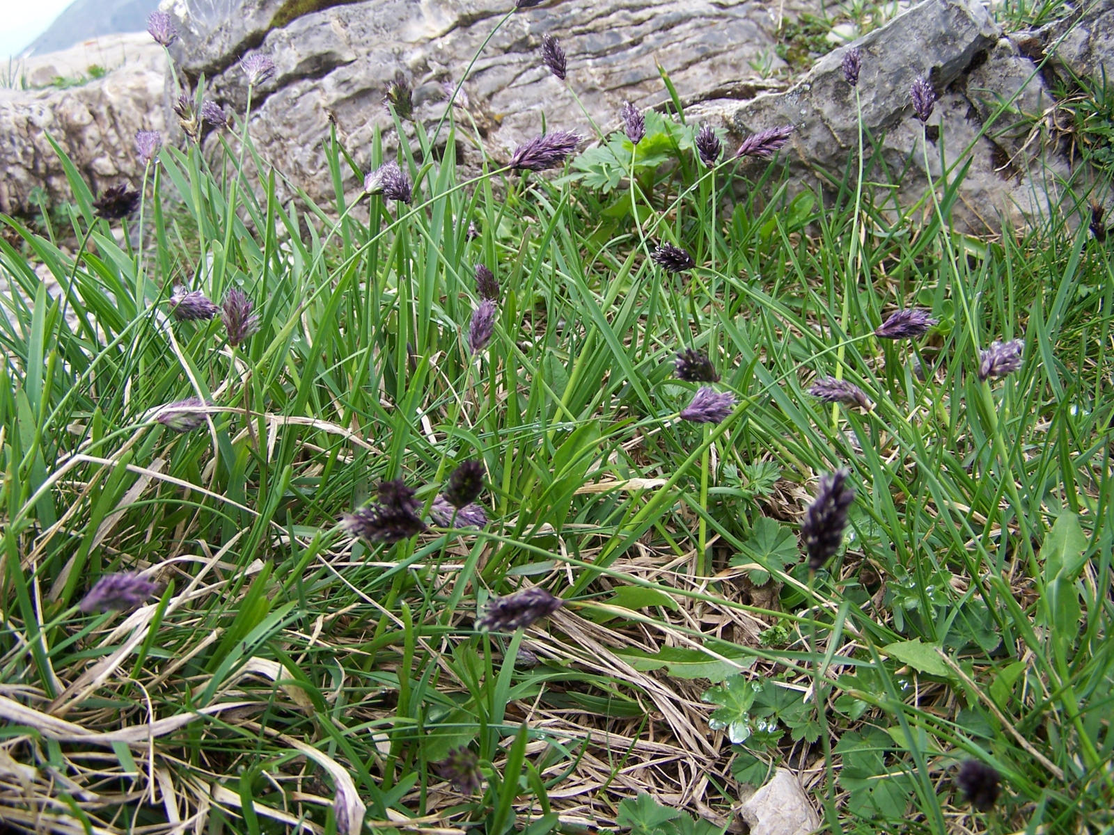 Sesleria tatrae (pl. sesleria tatrzańska), habitat: Tatra Mountains, Ciemniak, Skała Piec